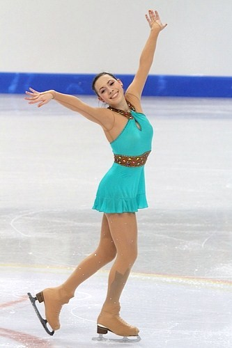 Патриция Глешчич (Словения) на чемпионате мира по фигурному катанию среди юниоров 2012